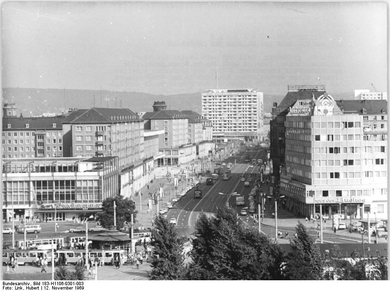 Dresden, Ernst-Thälmann_Straße Zentralbild Deutsche Demokratische Republik 12.11.1969 -schw. Die Bezirksstadt Dresden aus den Trümmern des Krieges neu erstanden Festlich, großzügig, hell und weit bietet die Ernst-Thälmann-Straße, benannt nach dem im Konzentrationslager Buchenwald ermordeten Führer der deutschen Arbeiterklasse, einen wesentlichen Einblick in das Baugeschehen, das in den letzten 20 Jahren in der Elbmetropole durchgeführt wurde. Sie erstreckt sich vom Pirnaischen Platz über den Altmarkt zum Postplatz (vorn im Bild). In den Jahren 1965-67 entstand hier der größte Gaststättenkomplex der DDR, die Großgaststätte "Am Zwinger" (links). Rechts bildet das Institutsgebäude, das auch das Haus des Buches der Elbestadt beherbergt, den zweiten Neubaukomplex am Postplatz. Foto: Link Copyright: ADN-Zentralbild Bitte beachten Sie auch die Fotos: H1106-0301-001 H1106-0301-002 und H1023-0023-001